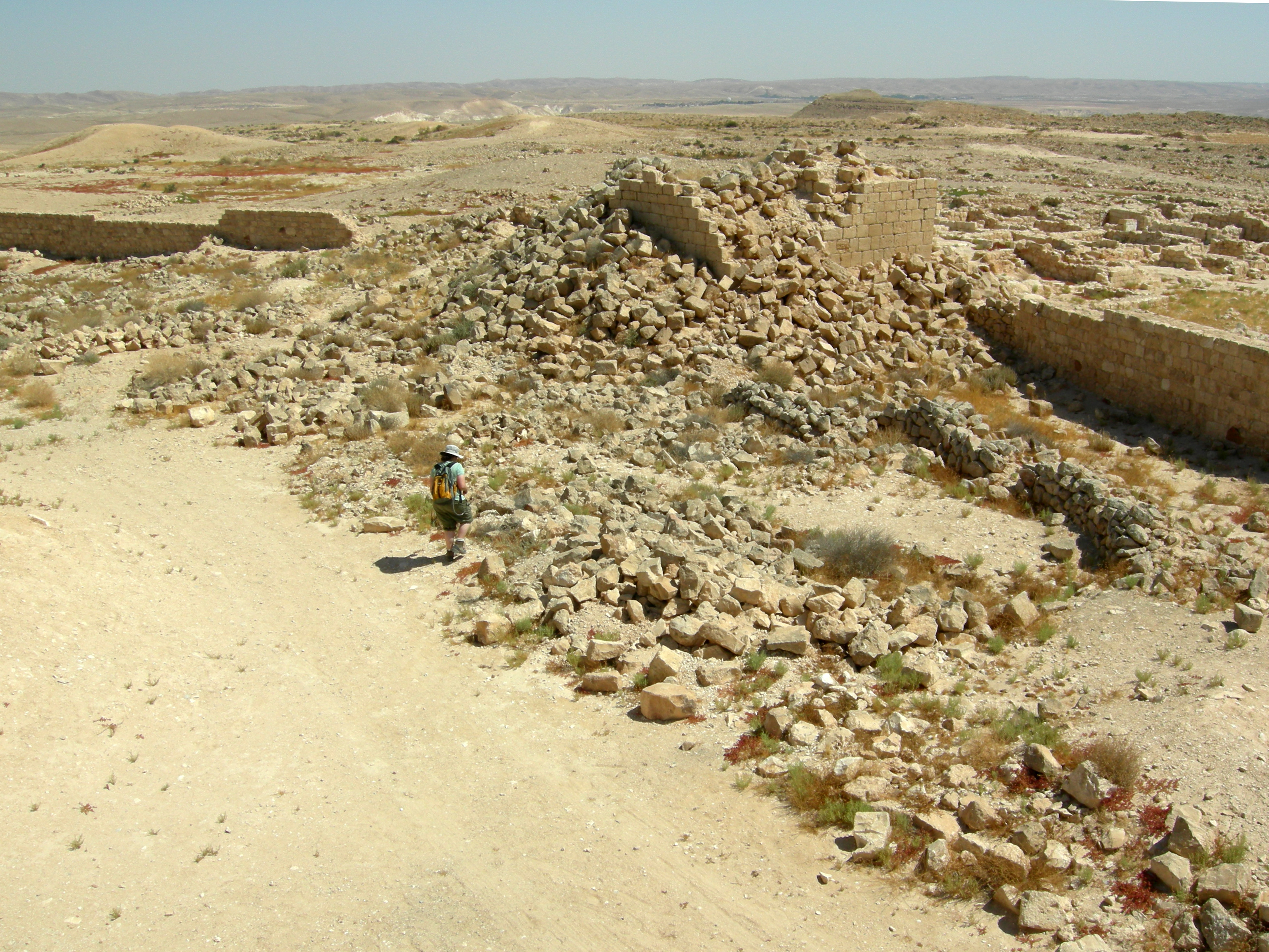 Avdat